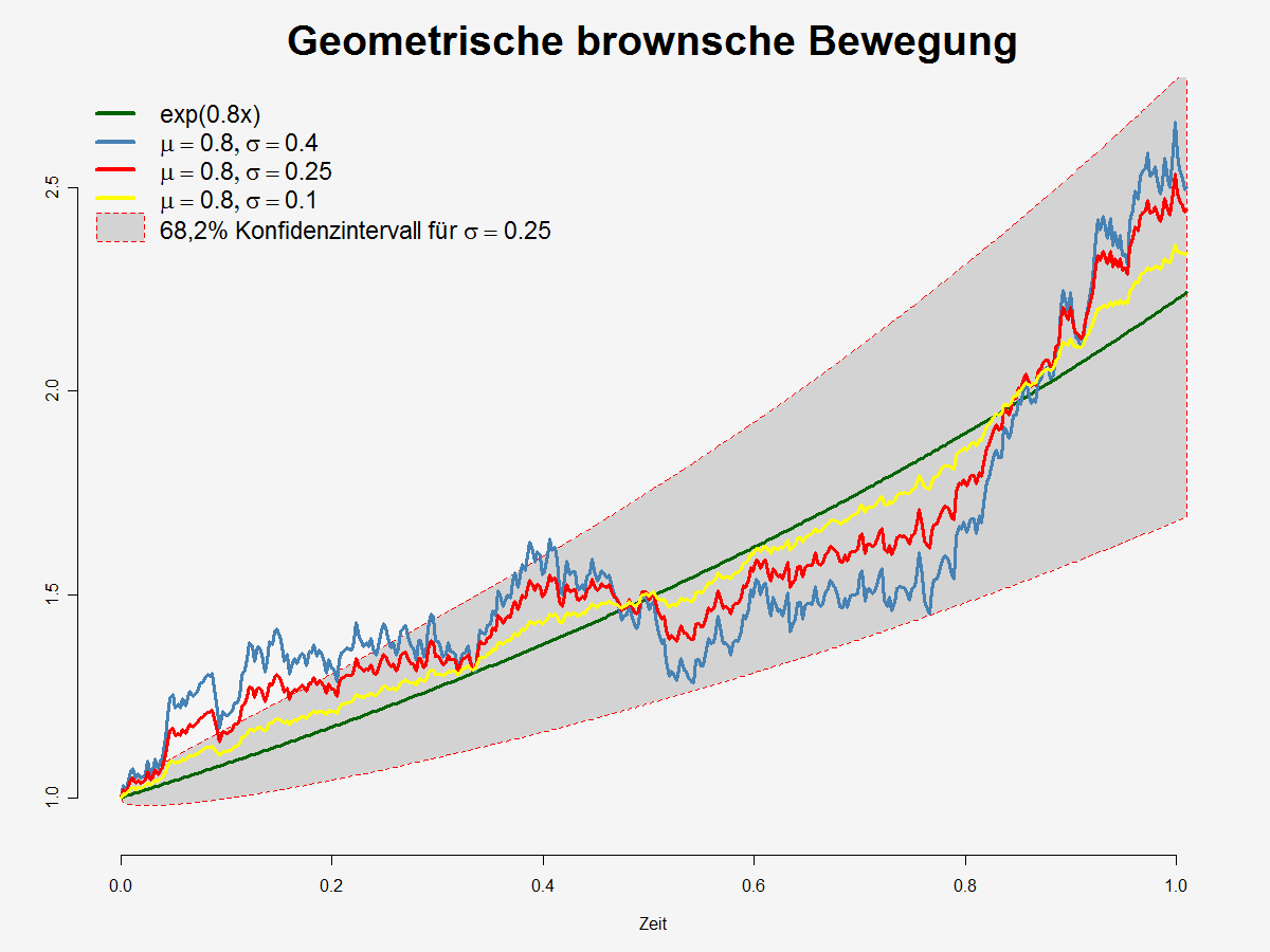 Unabhängige Geometrische Brownsche Bewegung mit unterschiedlichen Volatilitäten